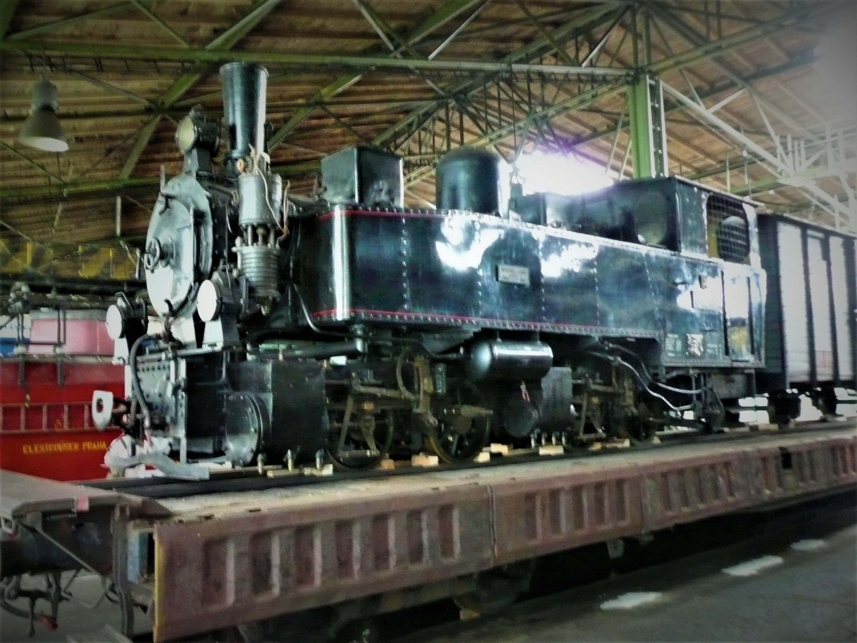 Mallet-Lokomotive U 47 001 im NTM Depot Chomutov